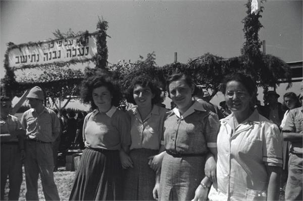 "בני ציון" - ממשפחות המתיישבים בתמונה (משמאל לימין): ציפורה גפן, שולה חיץ, יהודית טלאור, לוטה (ורצל) גצלר ממושב בני ציון. בתמונה רואים את משפחות המתיישבים הראשונים של הכפר בני ציון אשר לא הייתה להם קרקע פרטית משלהם. יצחק ברטשניידר ז"ל נאבק עבור המתיישבים מול פני הרשויות של היישוב היהודי והגדירם כבני המעמד הבינוני ובעלי ותק כחקלאים וכך קיבל עדיפות בתור לקבלת קרקע. המתיישבים קיבלו אדמה שנקראה "גבעות רעננה" וכן קיבלו תקציב בקרן היסוד, שם הישוב שונה לשם המוכר היום "בני ציון". בטקס העלייה לקרקע נאם אבא הילל סילבר (יושב ראש ההסתדרות הציונית דאז) והבתים הראשונים הוקמו ברחובות "אנשי בראשית" ו"חורשת האורנים", רחובות שעד היום קיימים בכפר. מסדר "בני ציון" האמריקאי תרם ועזר רבות ליישוב הראשוני של הכפר ולכן הוחלט לקרוא לכפר על שמו. בתמונה זו נראות כמה חברות מהכפר ביום העלייה לקרקע כאשר מאחוריהן יש שלט שעליו כתוב "...על פי כן... נעלה, נבנה, נתישב" מסתבר שהמילה הראשונה נכתבה בשגיאת כתיב ולכן כיסו אותה בפרחי הקישוט. מידע זה נחקר ונאסף על ידי הילה ידיד וגלית יוסף במסגרת קורס אקדמי במכללת סמינר הקיבוצים. תודה לארכיון כפר בני ציון, לדותן טאוב, מרים טאוב, עמרי אלעד, עופר אלעד ואבי גרוסמן.